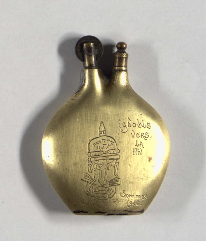 Briquet en cuivre autre face "ignoble vers la fin" (description : tête de soldat allemand grimaçant coiffé de son casque à pointe)en bas à droite : Somme 1916.